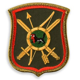 29-я гвардейская ракетная Витебская ордена Ленина Краснознамённая дивизия